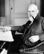 Willem de Sitter (1872 – 1934)